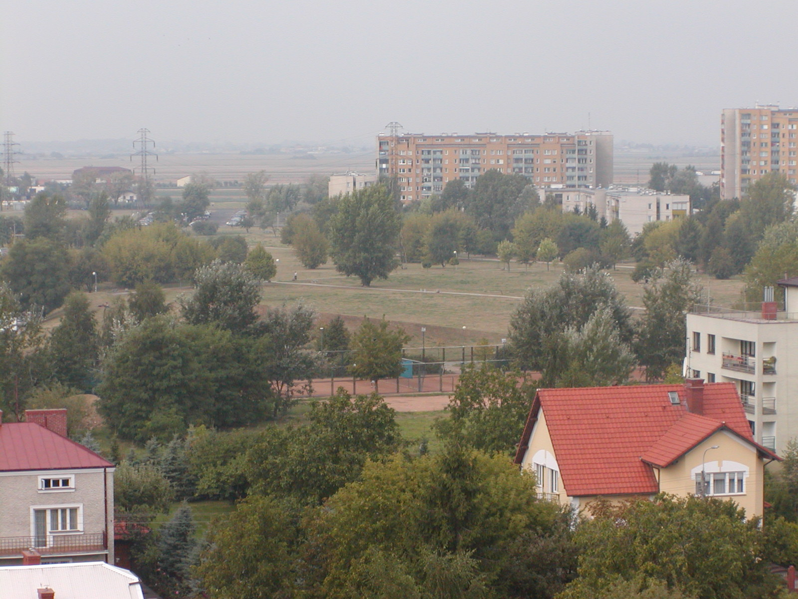 Park Górczewska. Tym razem widziany z balkonu jednego z bloków tego osiedla.